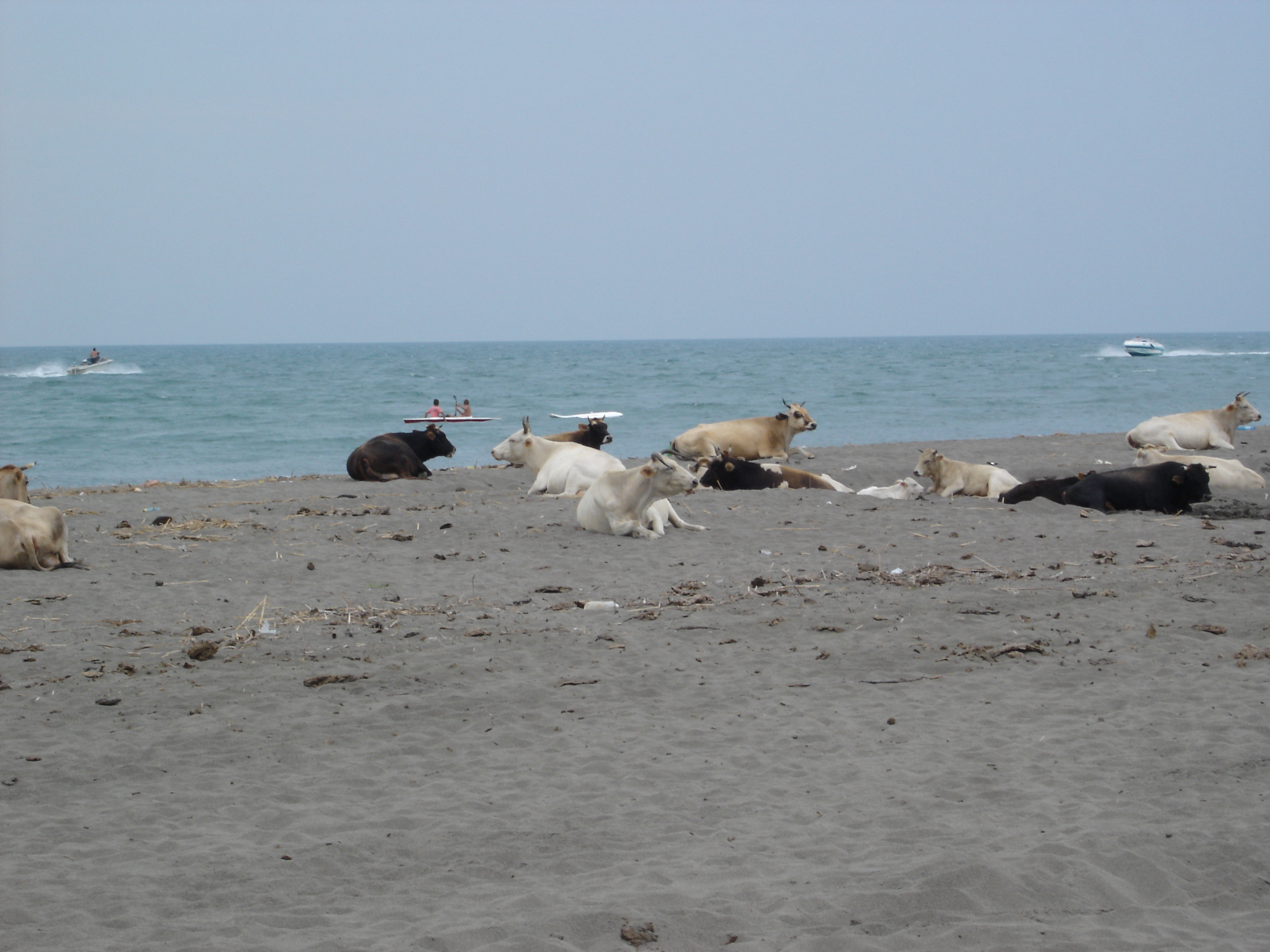 Slobodne krave Ade Bojane.